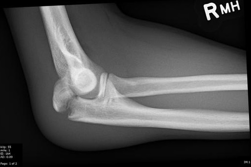 Fracture de l'olécrane